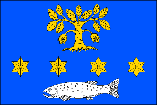 vlajka, Mladé Buky, okres Trutnov